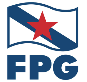 Logo da FPG